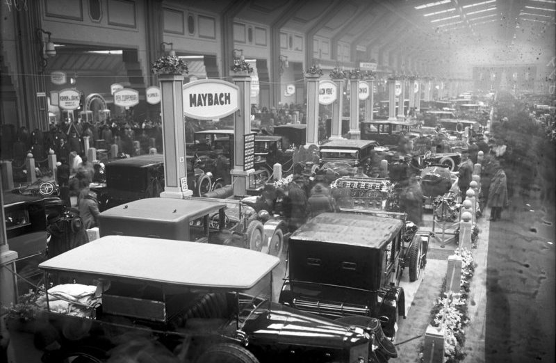 Zur Eröffnung der großen Berliner Automobil-Ausstellung am Kaiserdamm. Blick in die Ausstelungshalle der Luxusautos. Information added by Wikimedia users.Berlin, Automobilausstellung